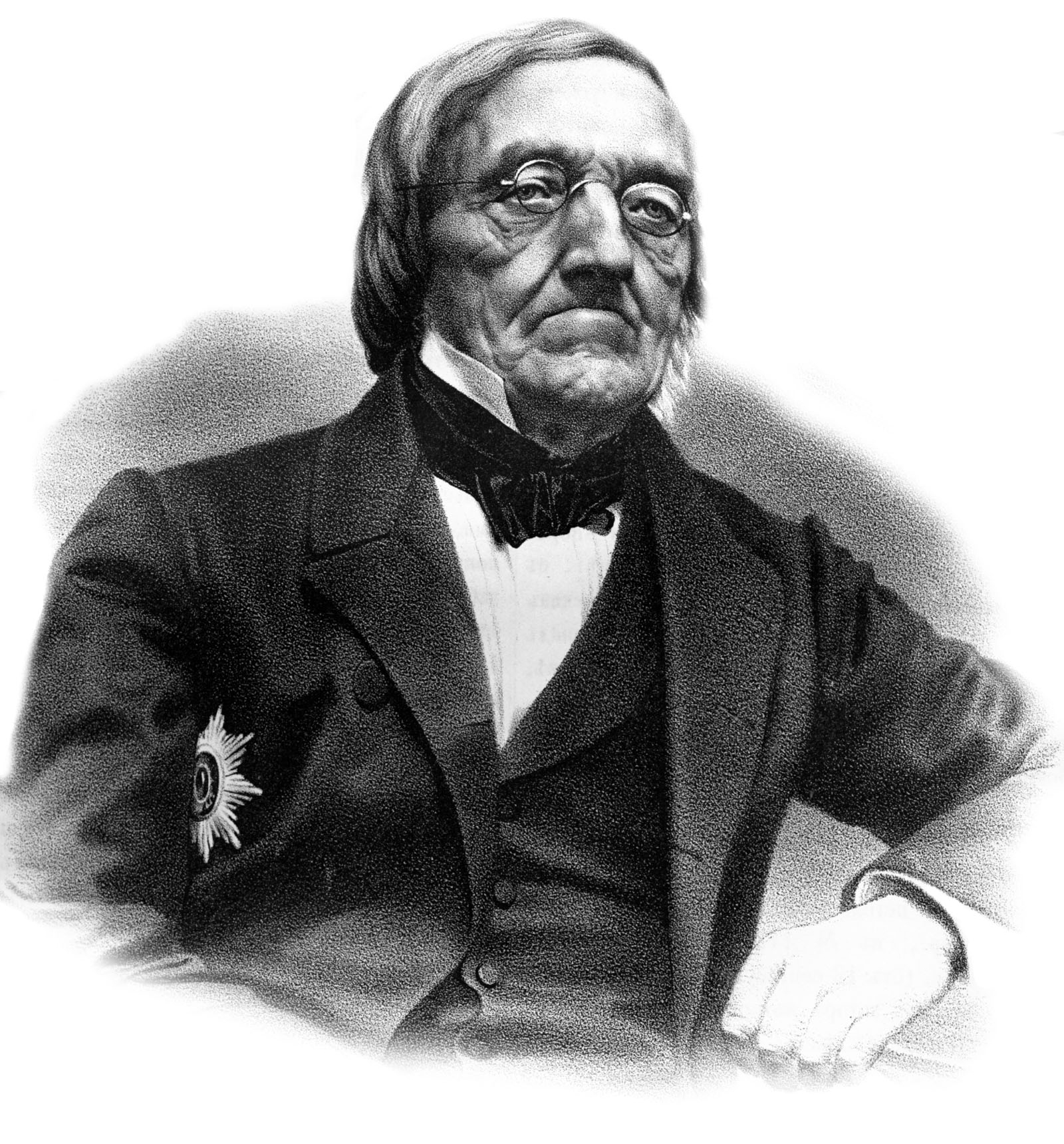 C. BAER. Съ Фотогр. Ранделя. Лит. А. Мюнстера, СПБ. Imp. Lith. A. Munster (Editeur)